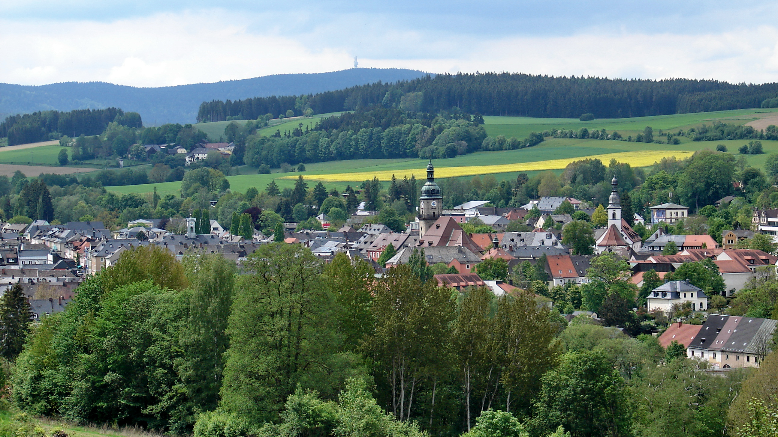 Wunsiedel ist die Kreisstadt des oberfränkischen Landkreises Wunsiedel im Fichtelgebirge und liegt an der Bayerischen Porzellanstraße.